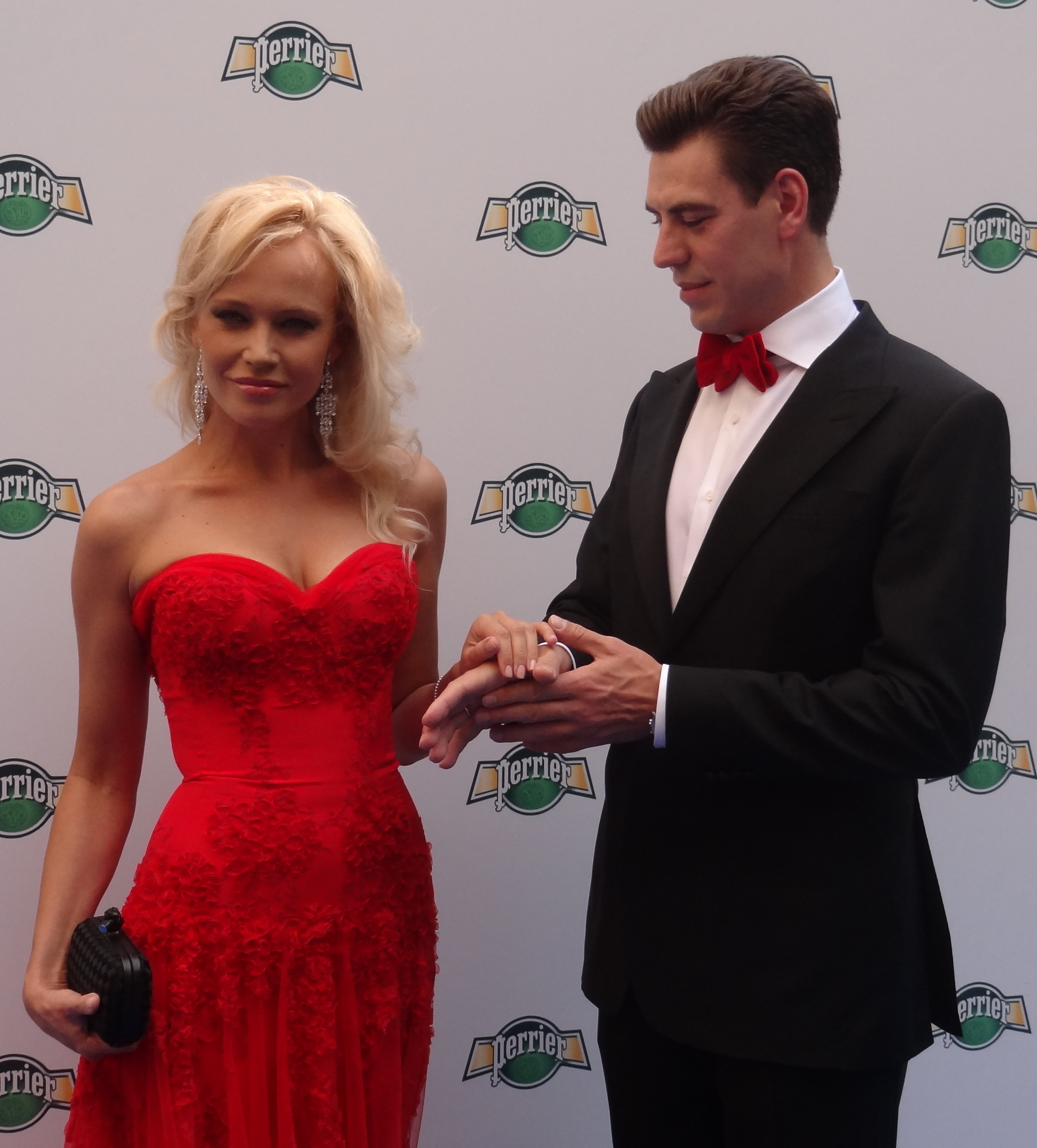 Церемония открытия фестиваля "Кинотавр"-2013 в Сочи. Дмитрий Дюжев с супругой.